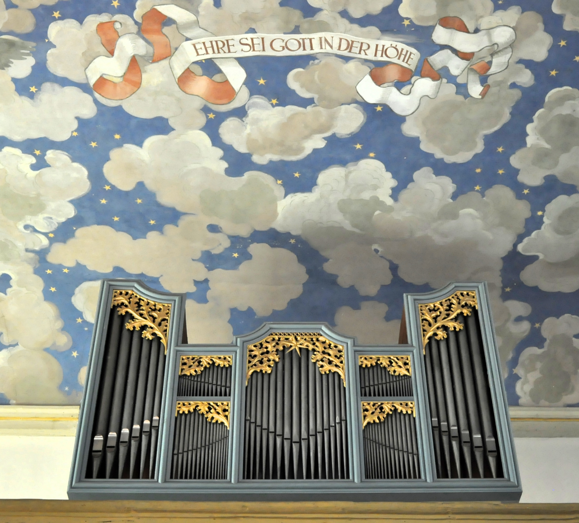 Orgel in Kloster Altfriedland